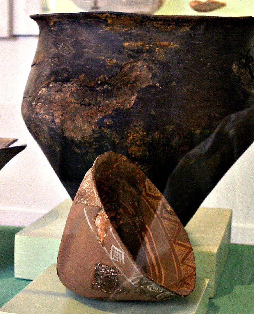 Cerámica hastáttica hallada en la necrólis de Las Madrigueras (Carrascosa del Campo)